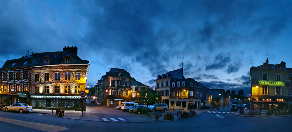 Cormeilles, Eure, Normandie, France.